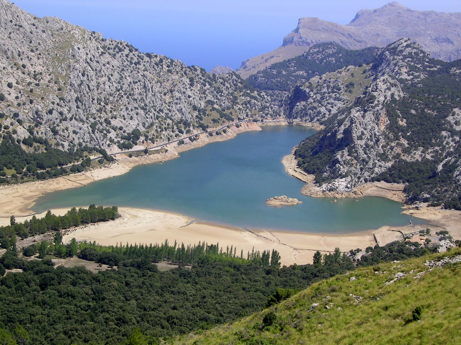 Embassament des Gorg Blau, Escorca, Mallorca, Spain